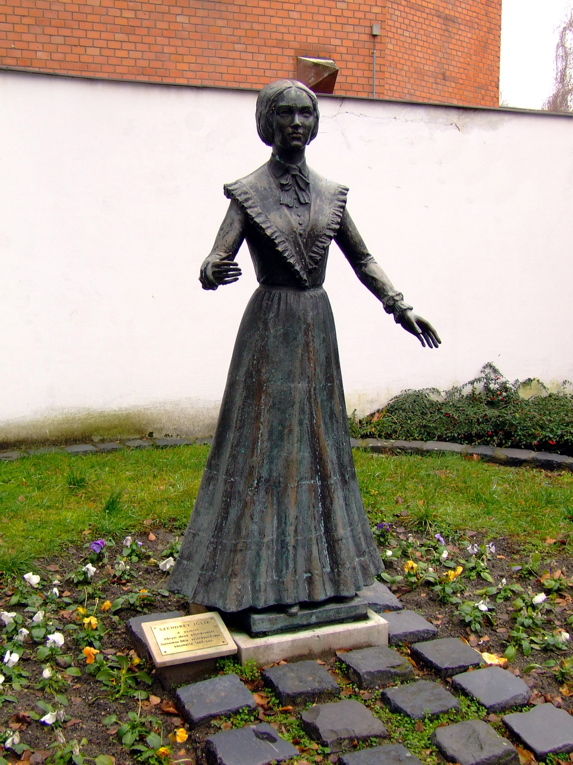 Szendrey Júlia szobra Kiskőrösön, Petőfi Sándor utca, A volt zsinagóga (Petőfi Sándor tér 3) mellett kialakított rendezett teresedésben helyezkedik el. Domonkos Béla alkotása (1985). Forrás:[1]